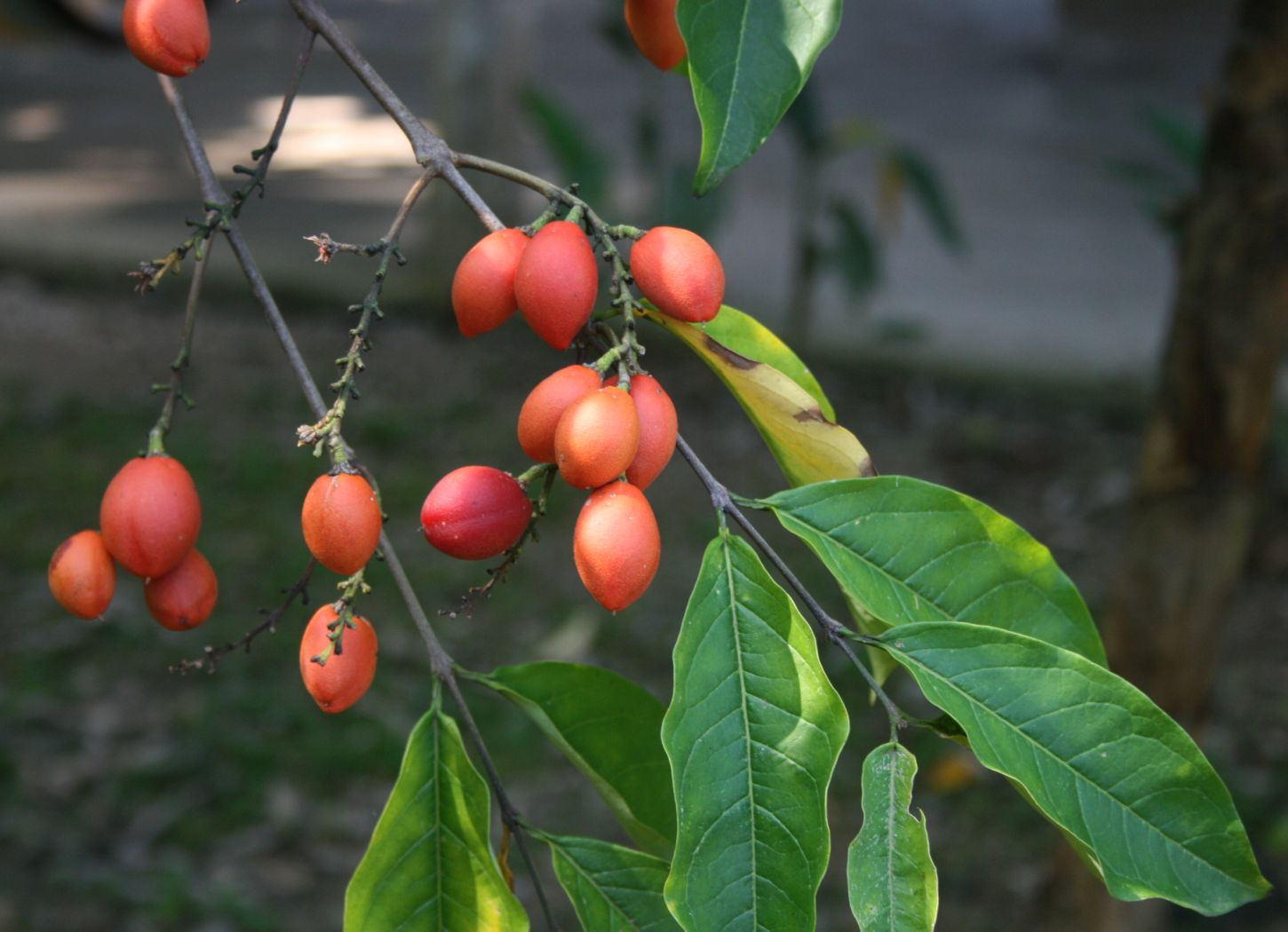 Bunchosia nitida, Malpighiaceae - Costa Rica: Prov. Puntarenas, Hacienda Barú NW Dominical